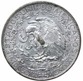 Fotografía de una moneda de un peso mexicano acuñado en 1921. Por haberse emitido antes de 1923 se considera del dominio público.